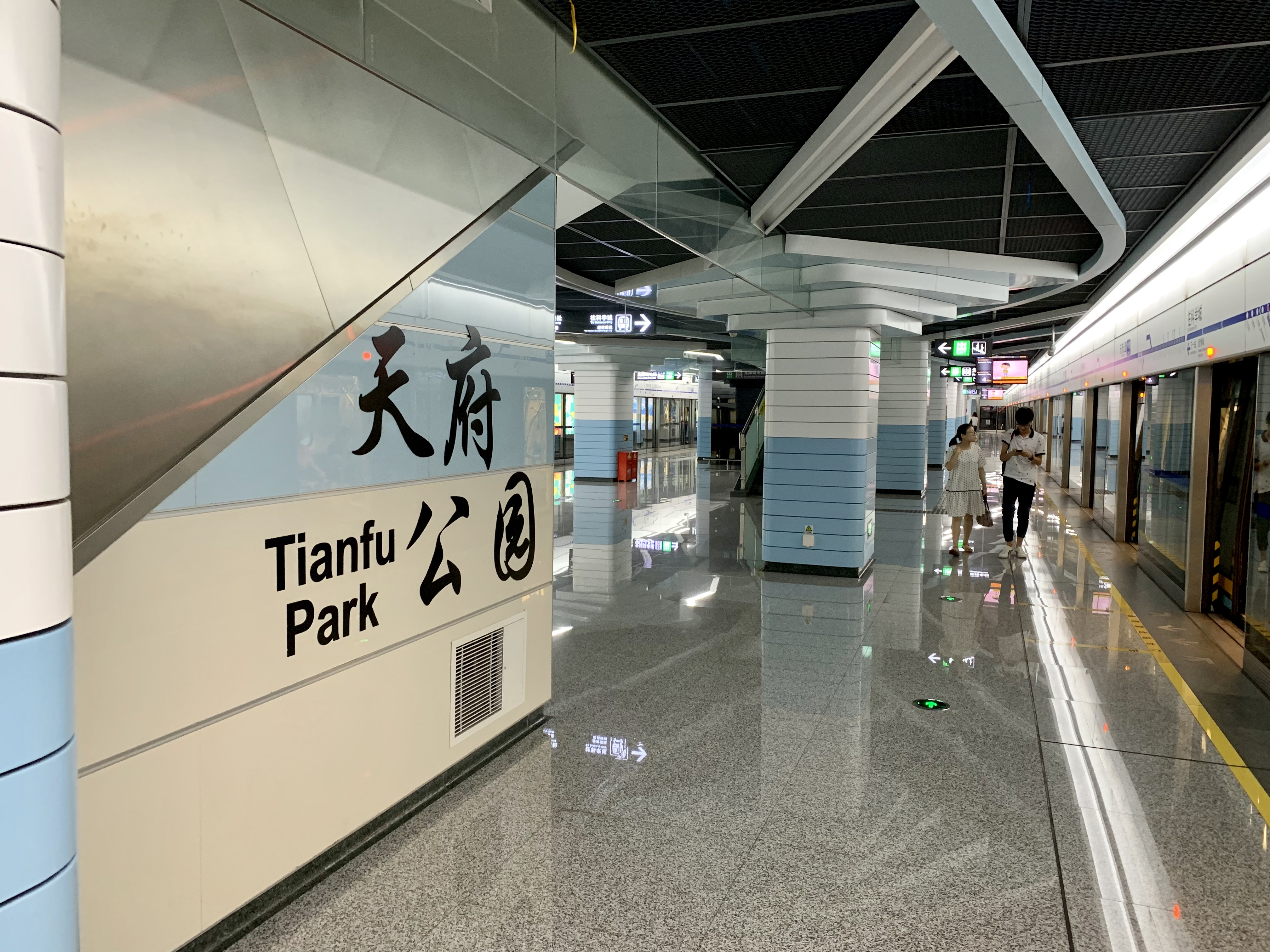 成都地铁天府公园站